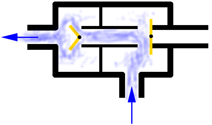 Halboffenes Ventil der Ambu-Reihe in Exiration